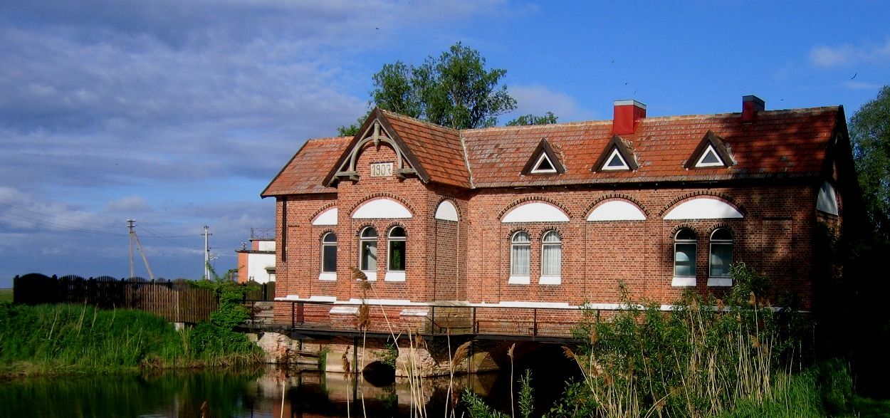 Autoriaus nuotrauka, 2006.05.27. Polderių muziejus, Uostadvario vandens kėlimo stotis, Rusnės sala. Nuotrauka gali būti platinama pagal GFDL licenciją.